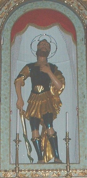 Solarino, Chiesa Madre S. Paolo Apostolo, Statue of St. Paul (XVIII sec.?)